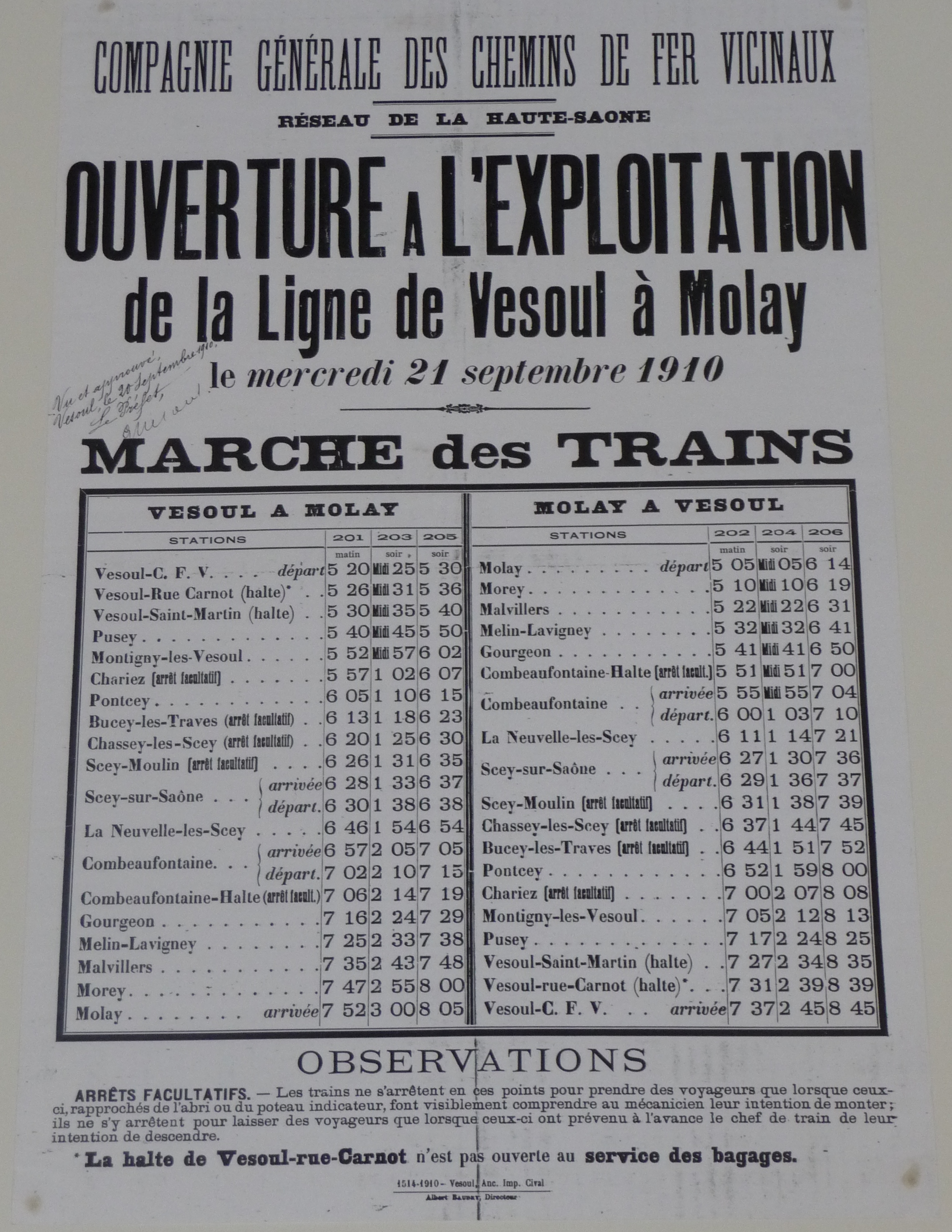 21 septembre 1910 horaires de trains Vesoul à Molay